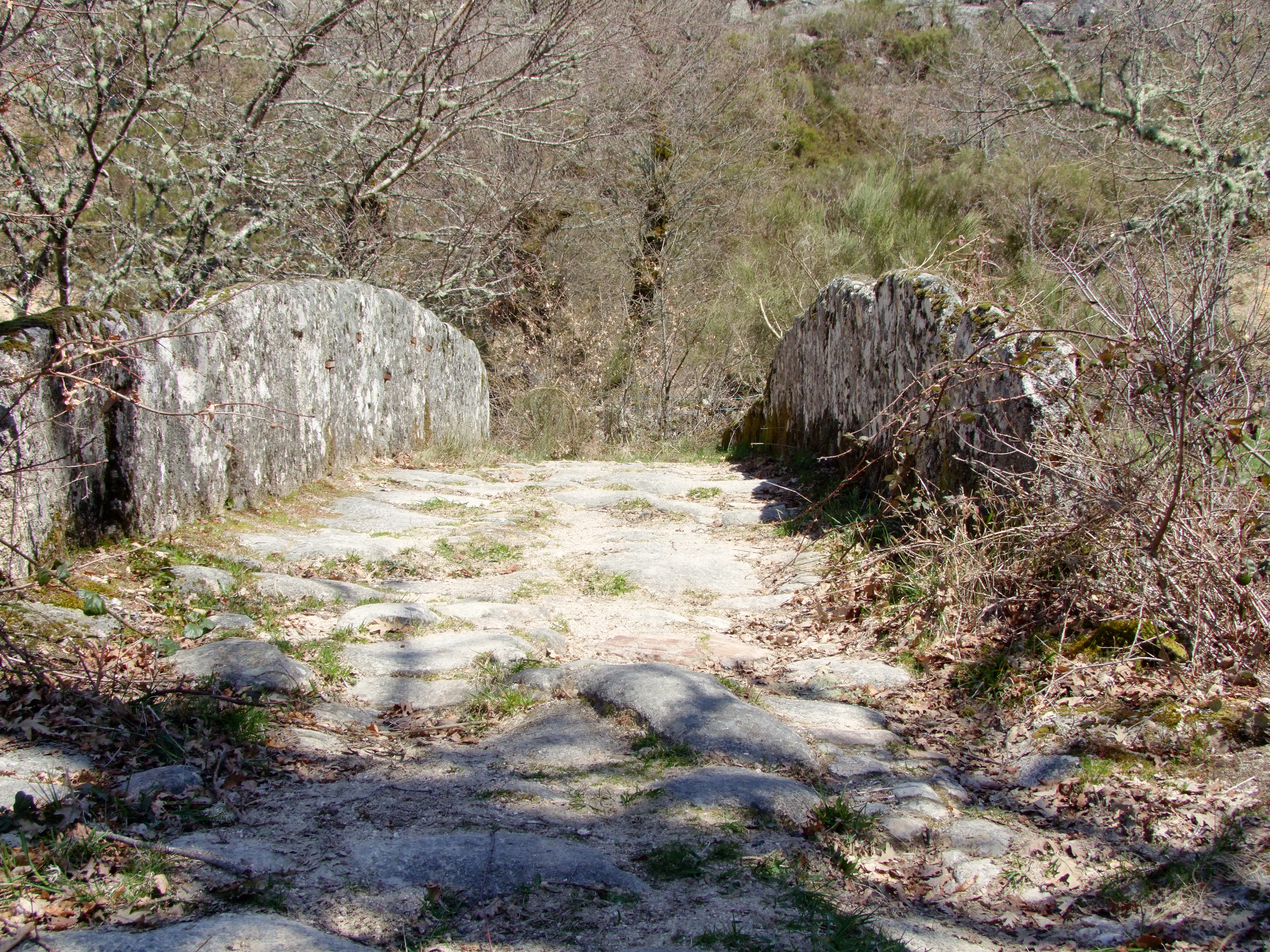 Ponte das Cainheiras. Portugal, Viana do Castelo, Melgaço, Castro Laboreiro, lugar das Cainheiras. This monument is classified as Imóvel de Interesse Público.